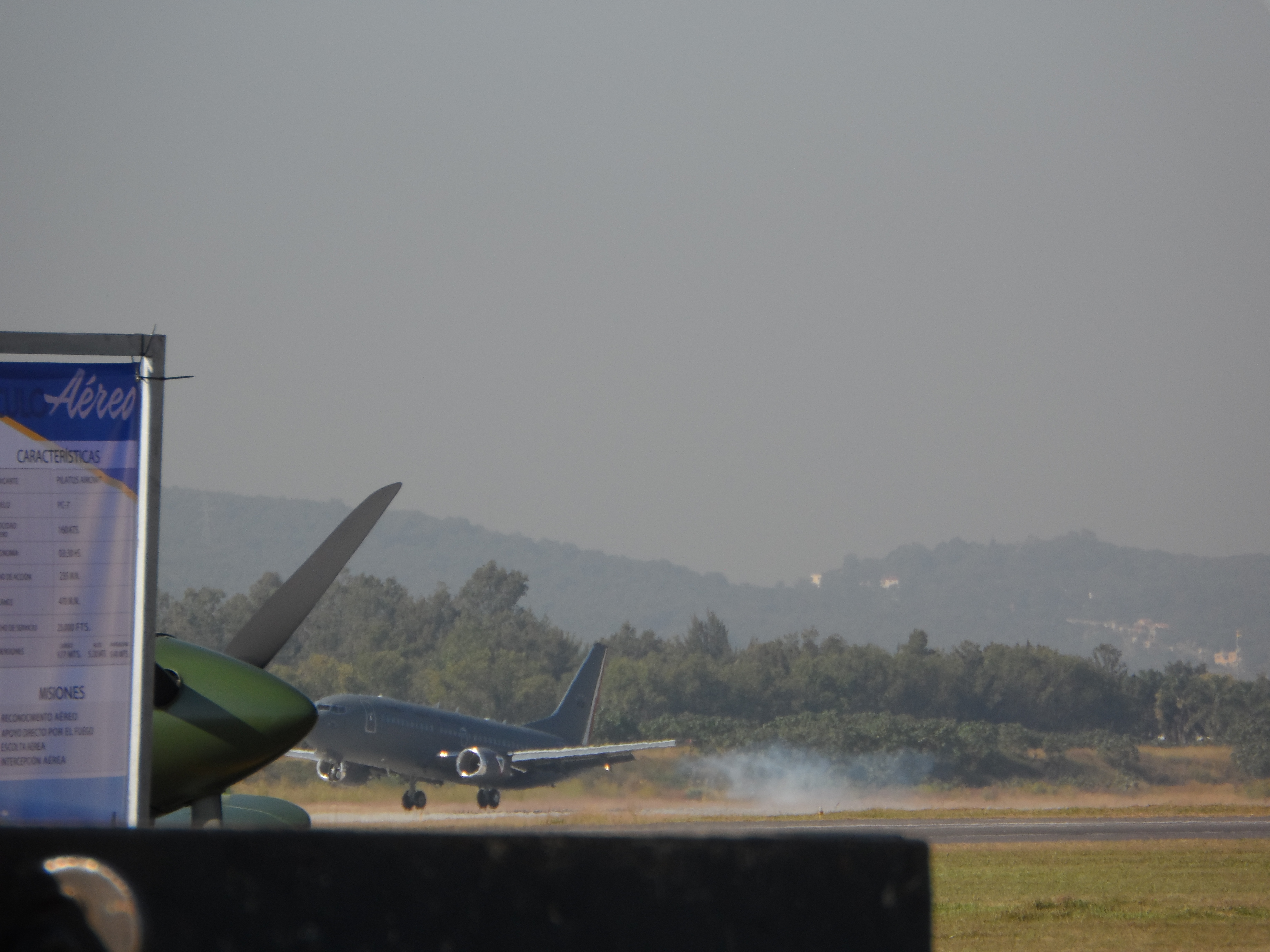 Avión Boeing 737-200 de la Fuerza Aérea Mexicana, perteneciente al Escuadrón Aéreo 502, aterrizando en la BAM No. 5, en Zapopan, Jalisco.